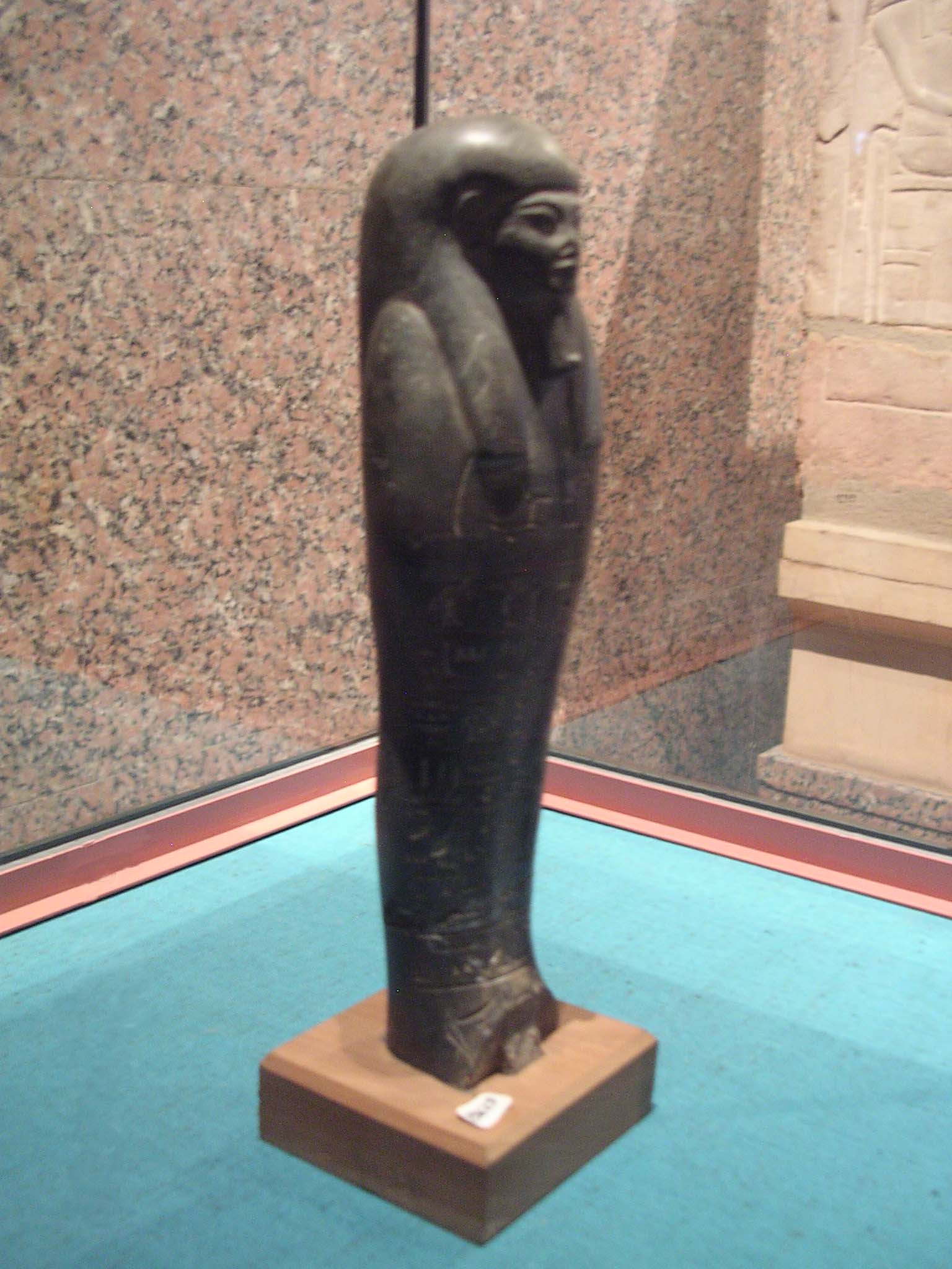 Ushabty di Hekanefer - Museo di Assuan. Autore Amaunet, lavoro proprio 2007, licenza GFDL